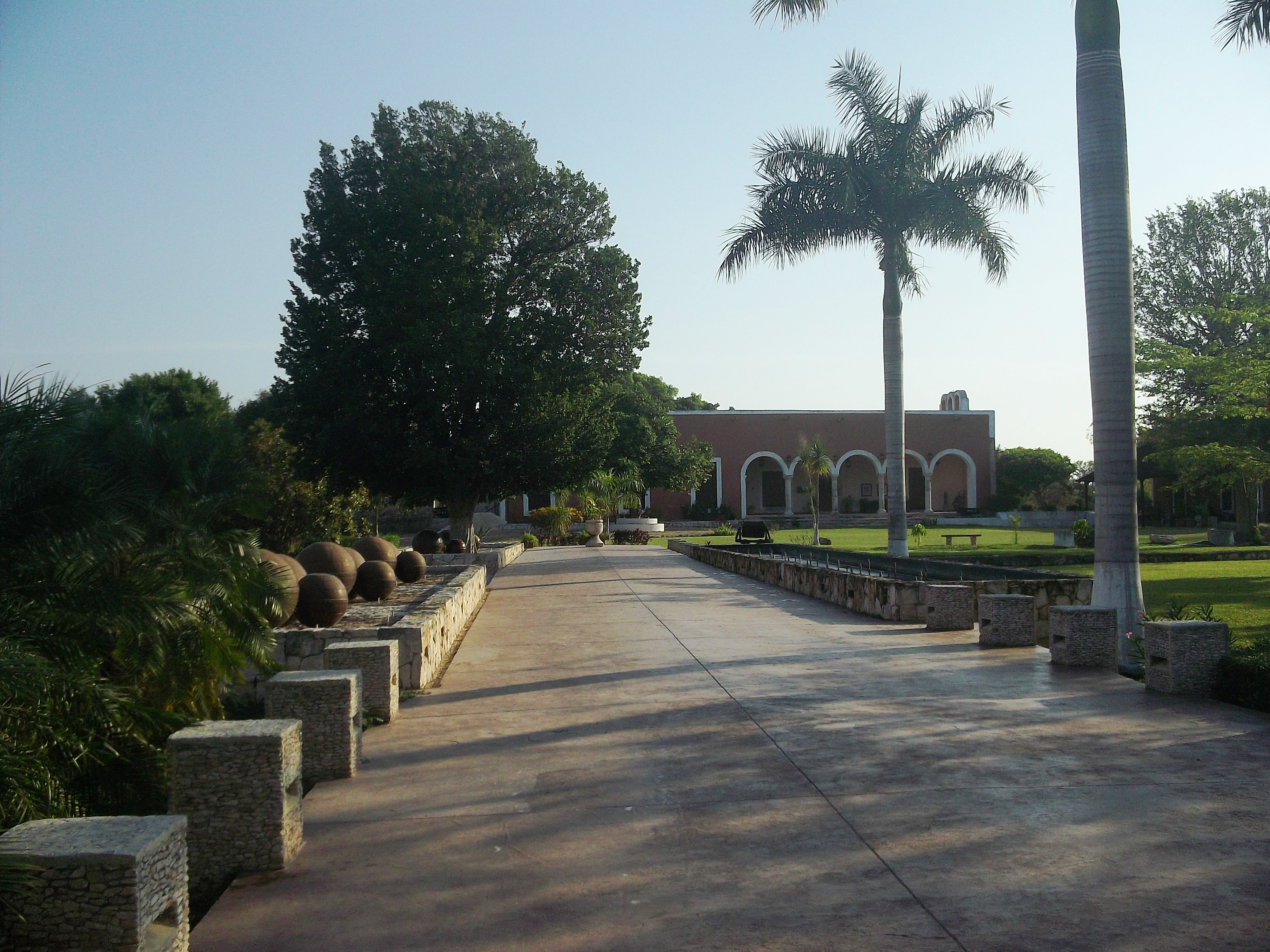 Hunxectamán (Umán), Yucatán.